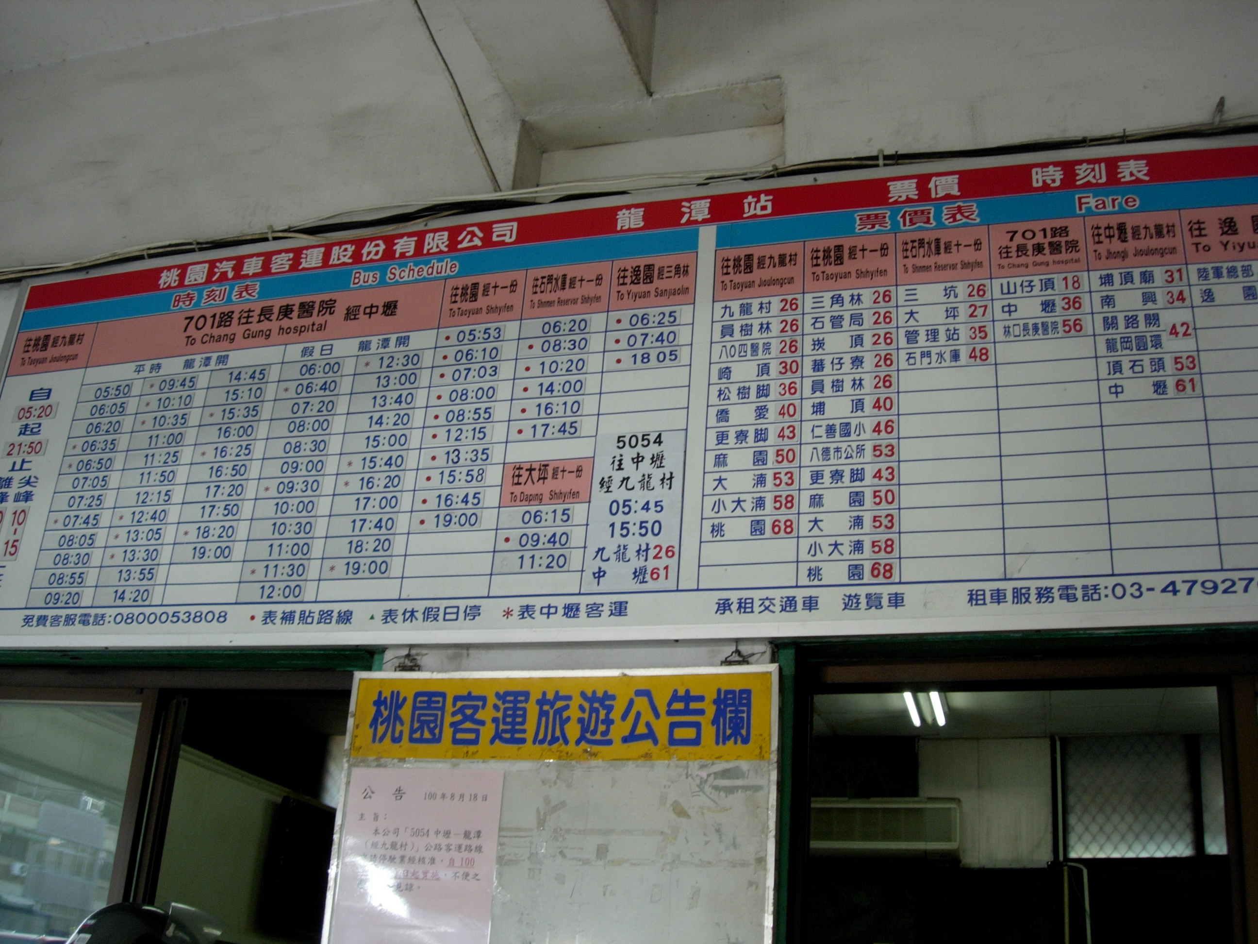 中文（台灣）: 桃園客運龍潭站票價時刻表